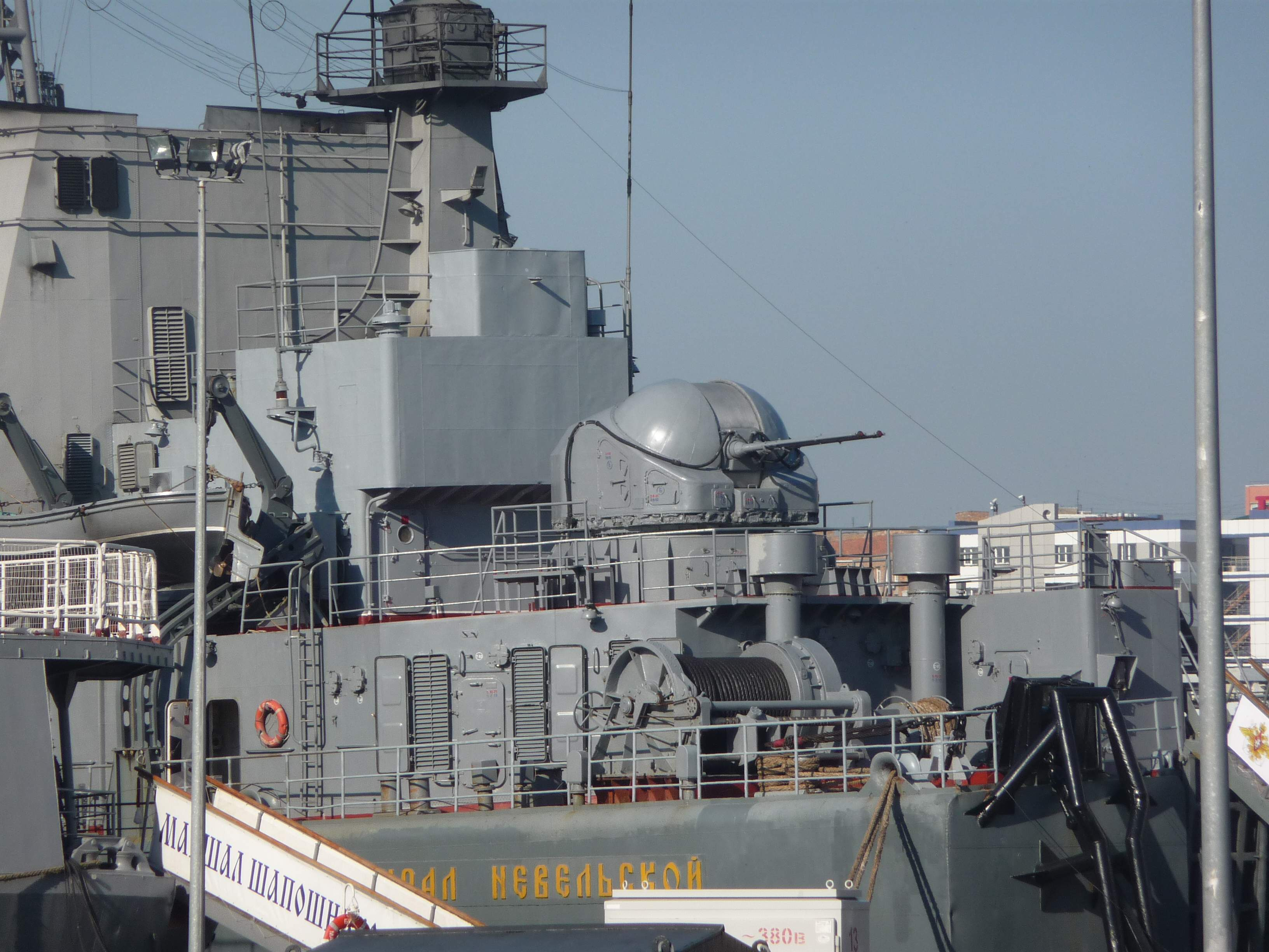 АУ АК-725 на БДК «Адмирал Невельской», Владивосток, 33-й причал, 2015-05-22